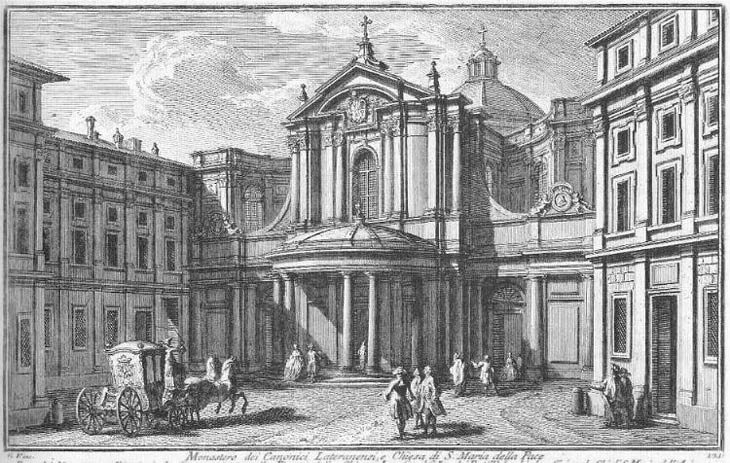 1) Entrance to the Monastery; 2) Buildings which form a sort of theatre; 3) Rear entrance to S. Maria dell'Anima.